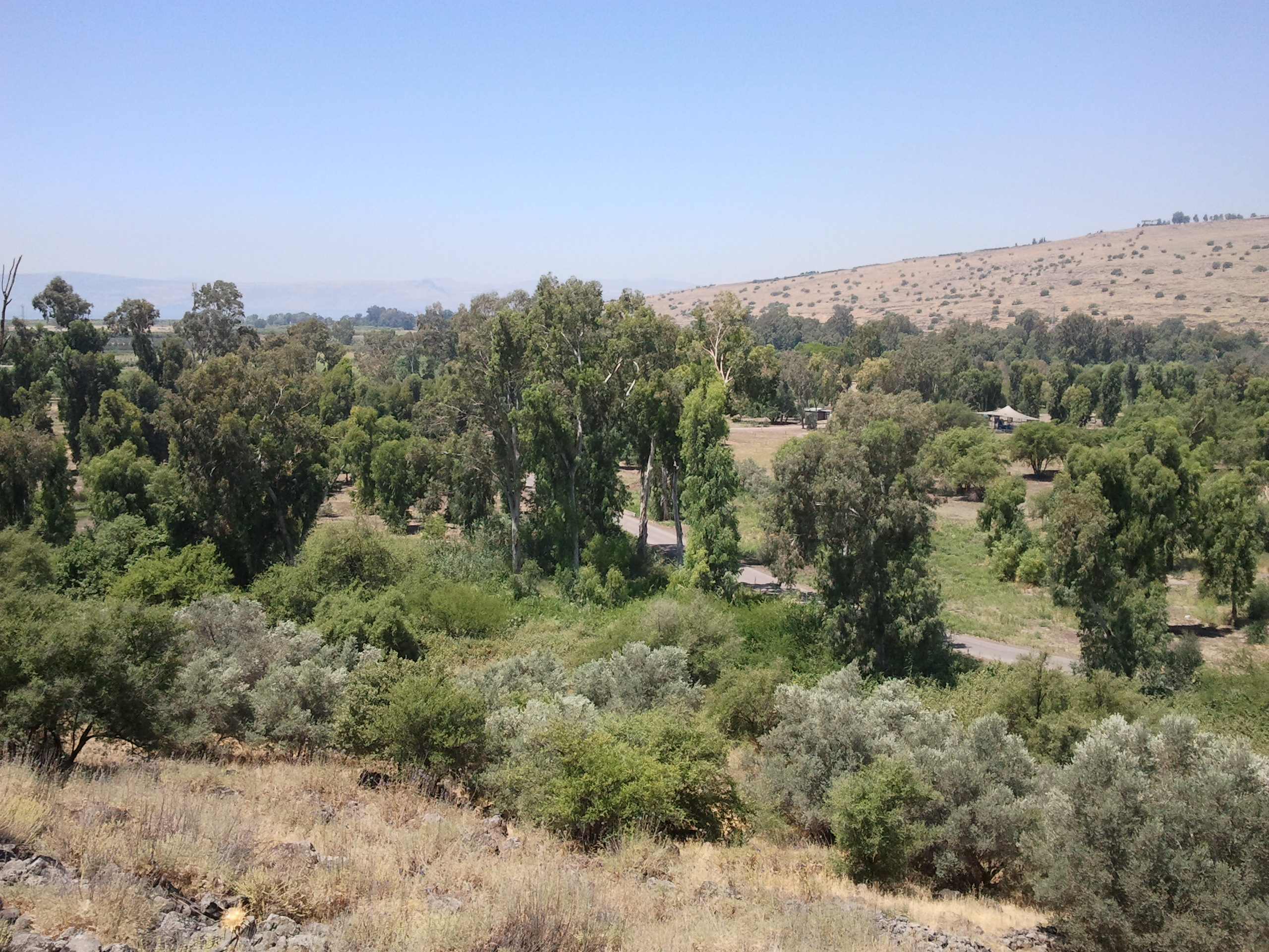 Category:Jordan River park, northern from Sea of Galilee, Israel פארק הירדן שוכן בצפונה של הכנרת. בתחום הפארק נמצא תל בית צידה תצפית על פארק הירדן מתל בית צידה